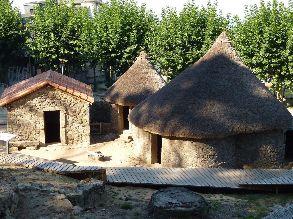 Pazos reconstruídos